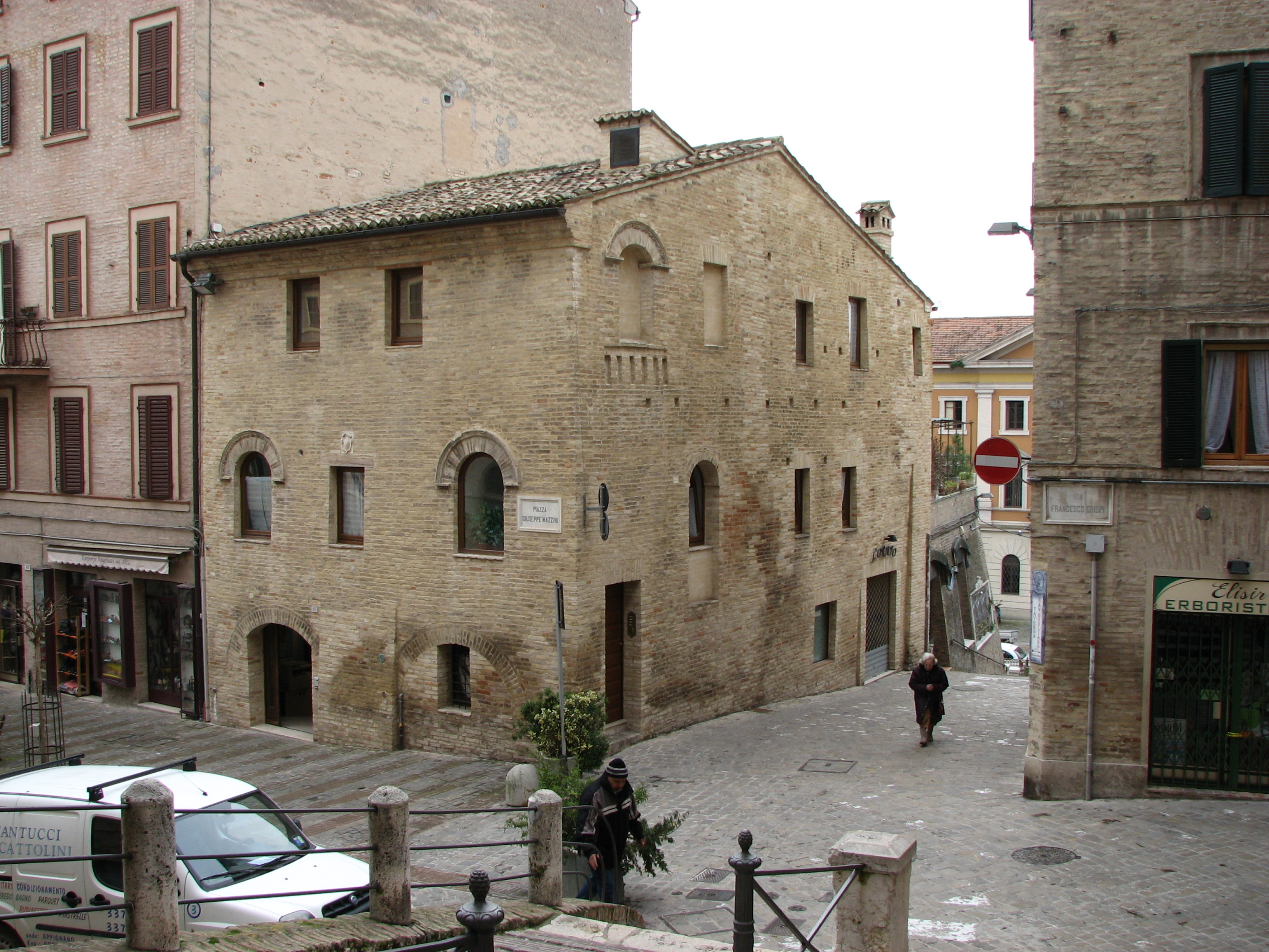 Casa del Podestà o Casa della Gabella dal 1373 su Piazza del Mercato